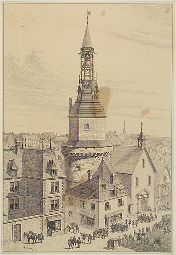 Dessin de Théophile Busnel montrant la chapelle Saint-James et la tour de l'horloge.